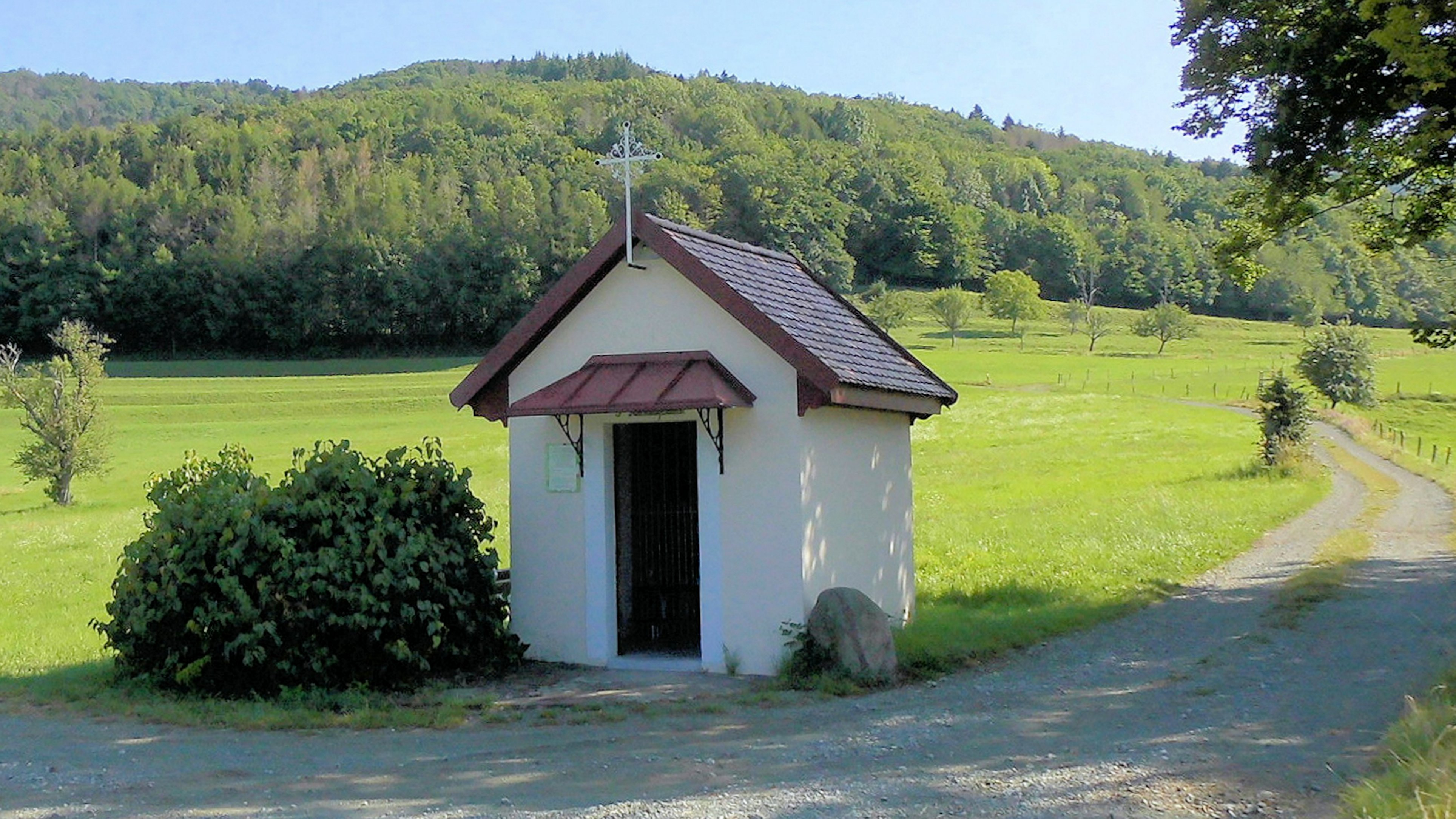 La chapelle des chouettes gite S'Kutzakapalala à Sickert